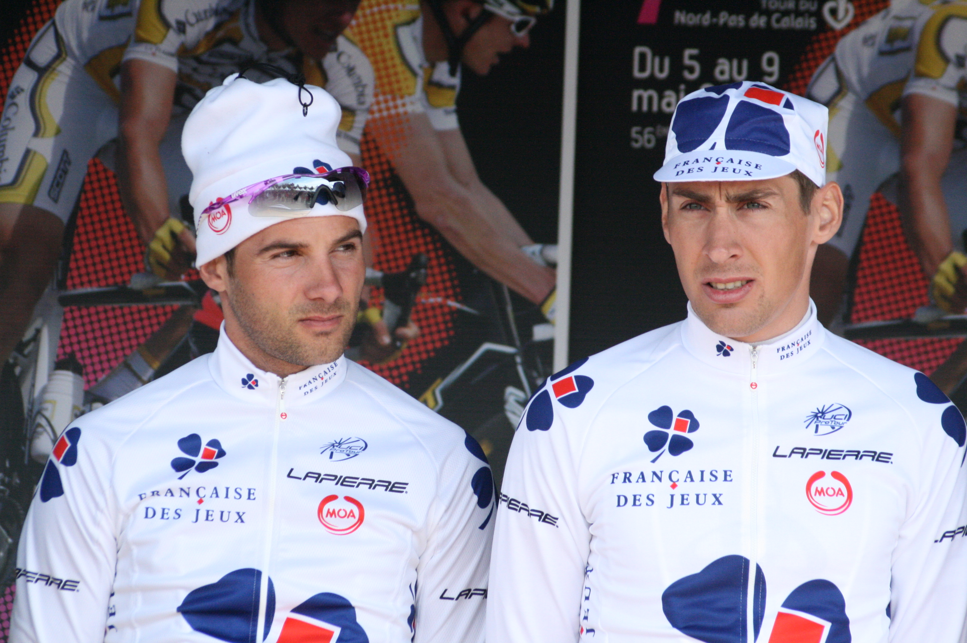 Olivier Bonnaire et Matthieu Ladagnous lors de la présentation des équipes des 4jours de Dunkerque 2010